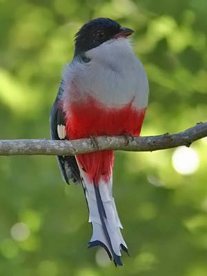 Cubaanse Trogon (Priotelus temnurus)